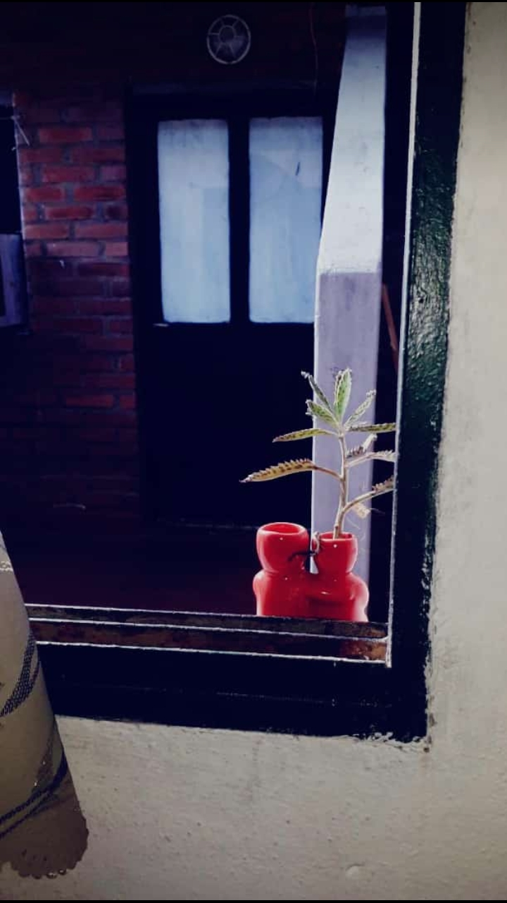 Luego de días de reinterados comunicados de extensión de la cuarentena, solo veo lo que sucede a través de la ventana.